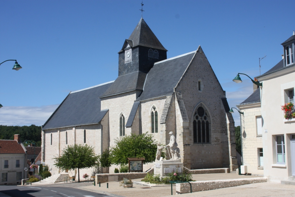 Eglise Saint-Vincent d'Orbigny (Indre-et-Loire)